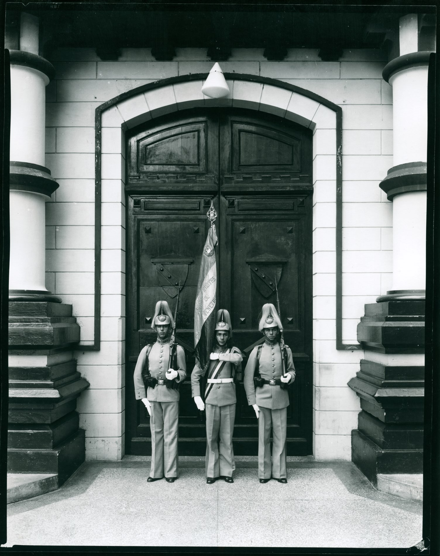 Cadetes.